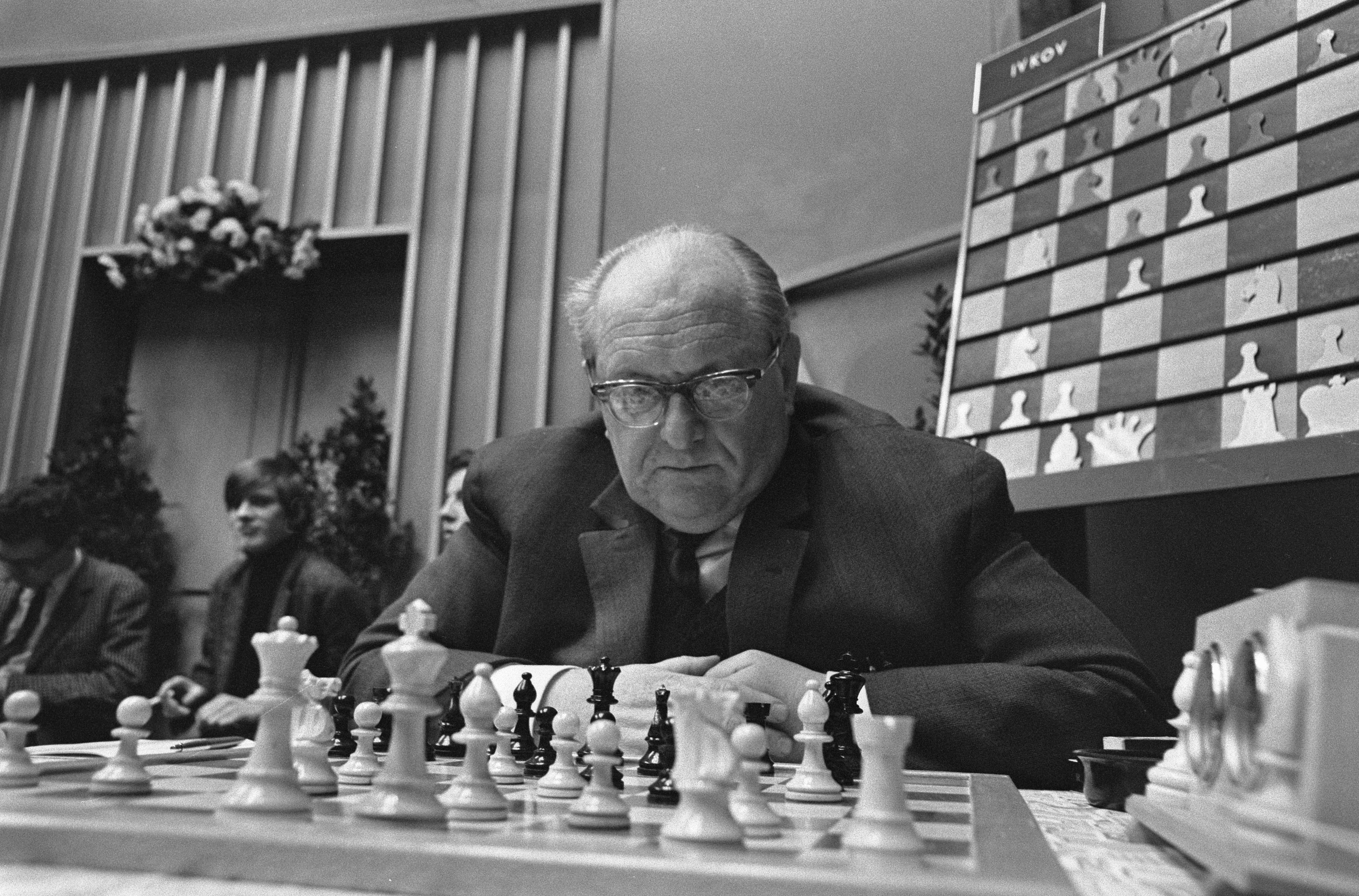 Collectie / Archief : Fotocollectie Anefo Reportage / Serie : [ onbekend ] Beschrijving : 28e Hoogoven schaaktoernooi te Beverwijk, Czerniak (Israel) Datum : 12 januari 1966 Locatie : Beverwijk Trefwoorden : portretten, schaken, sport Persoonsnaam : Czerniak Moshe Fotograaf : Kroon, Ron / Anefo Auteursrechthebbende : Nationaal Archief Materiaalsoort : Negatief (zwart/wit) Nummer archiefinventaris : bekijk toegang 2.24.01.05 Bestanddeelnummer : 918-6683